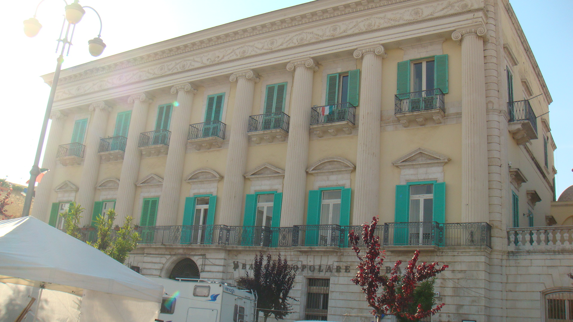 Palazzo marchese di Rende